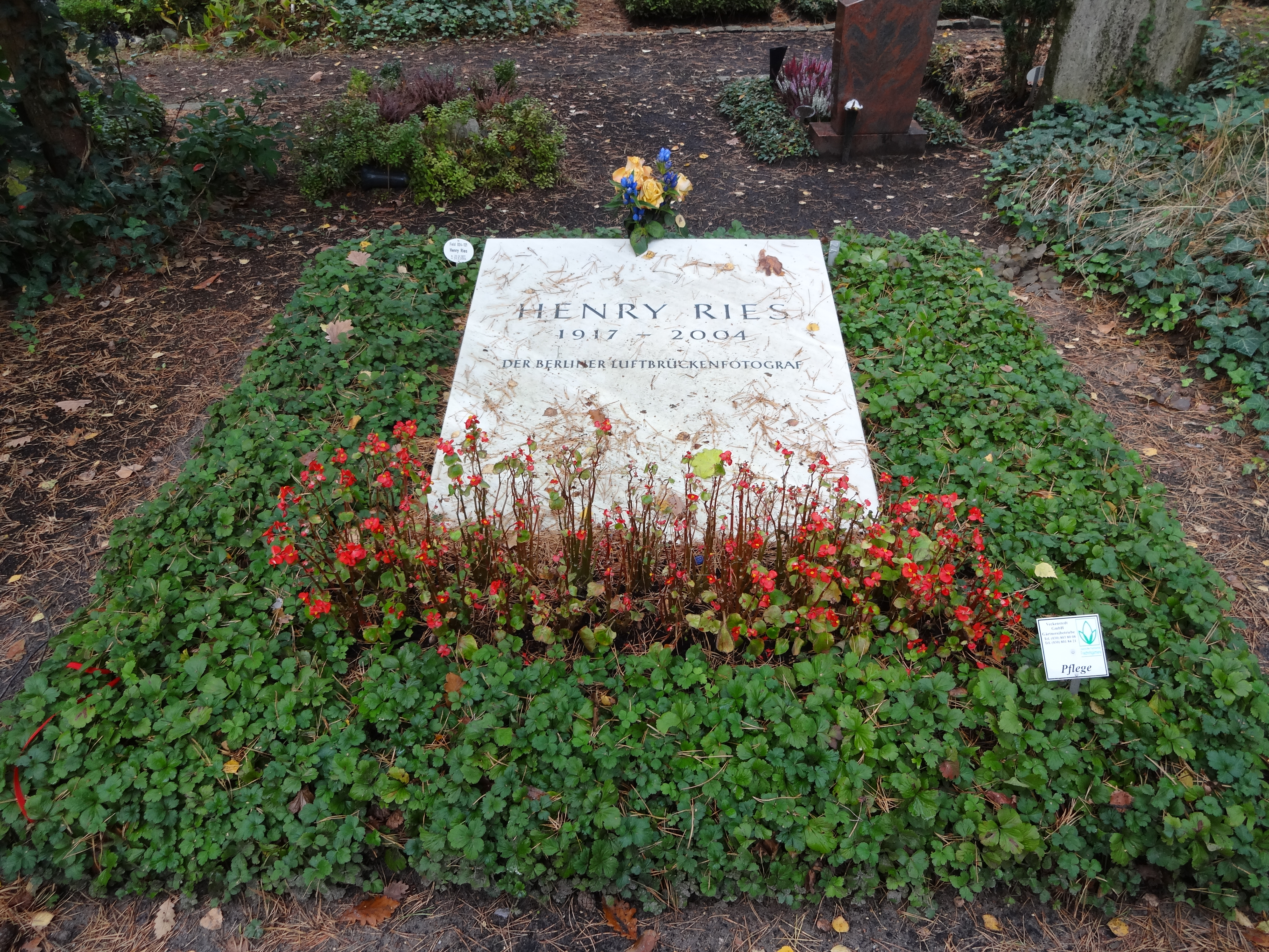 Grab von Henry Ries (Luftbrückenfotograf) auf dem Waldfriedhof Zehlendorf